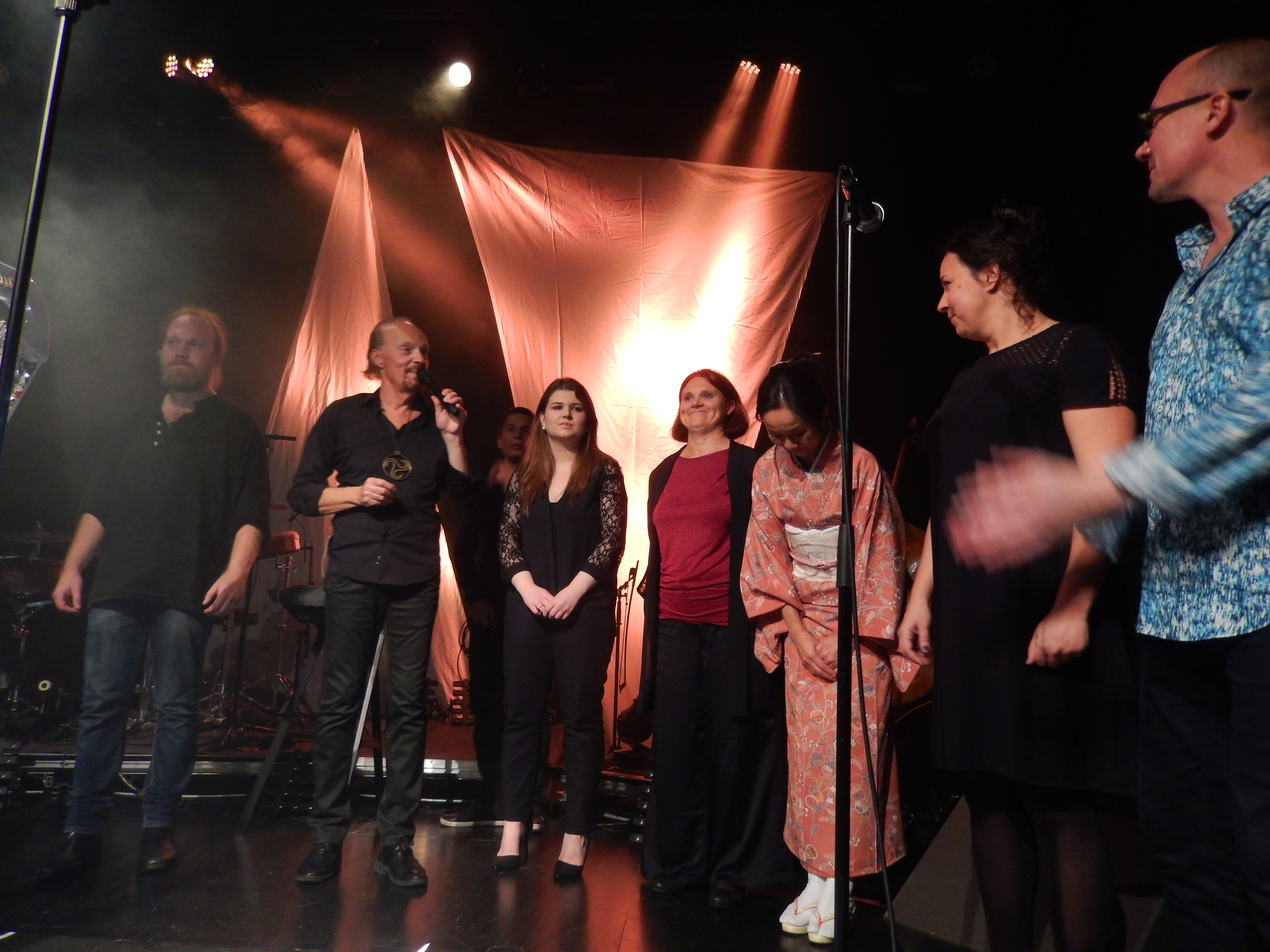 Alan Stivell en concert pour le premier concert de la tournée Amzer à La Citrouille Saint-Brieuc le 5 novembre 2015.